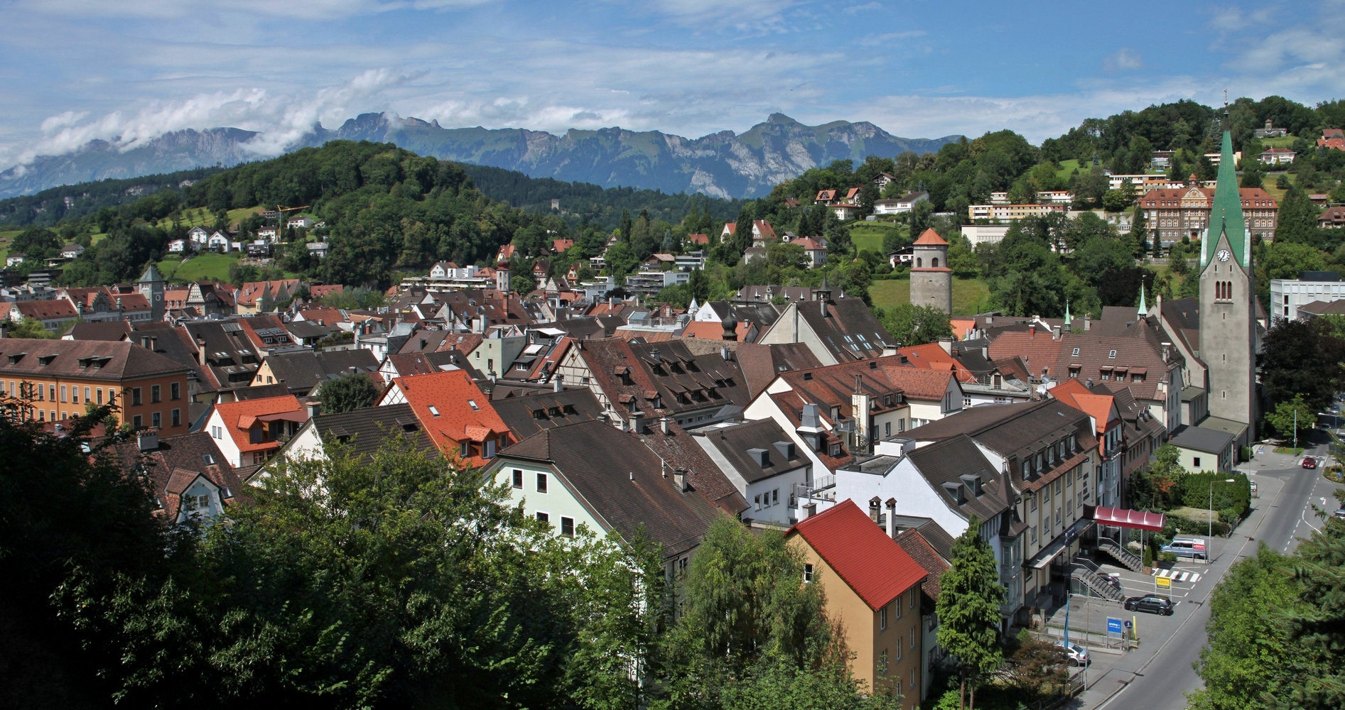 Feldkirch (Vorarlberg): Blick von der Schattenburg über die historische Altstadt, im Hintergrund ist das Alpsteinmassiv mit dem Hohen Kasten (1.794 Meter) zu sehen.